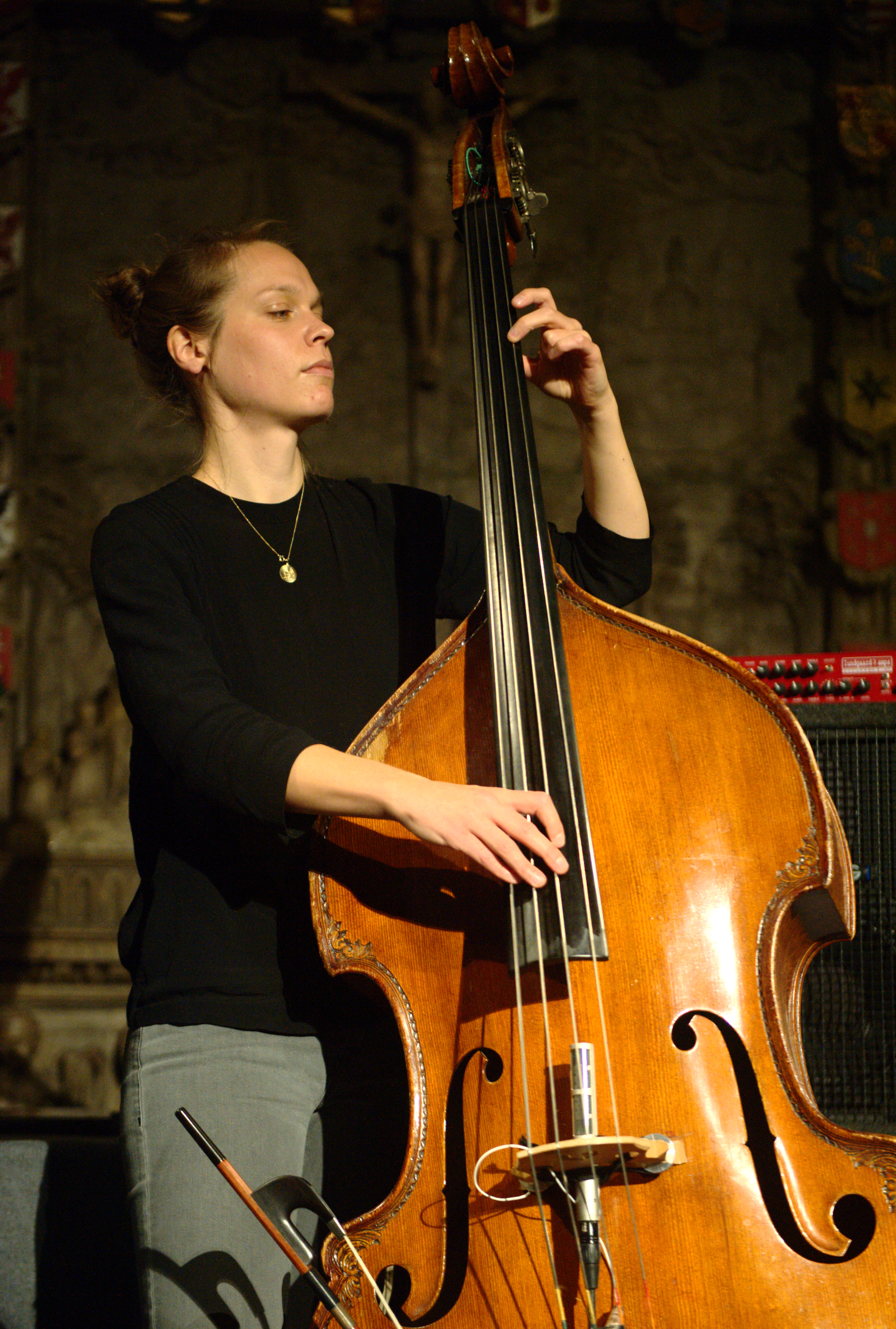 Hendrika Entzian mit ihrem Quartett bei einem Konzert in der Stadtkirche Darmstadt am 6. Oktober 2017